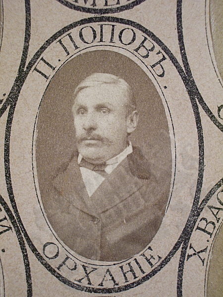 Павел Попов - Патю Чорбаджи като депутат в Учредителното събрание. 1878 г.